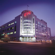 École de technologie supérieure du Québec (soir)